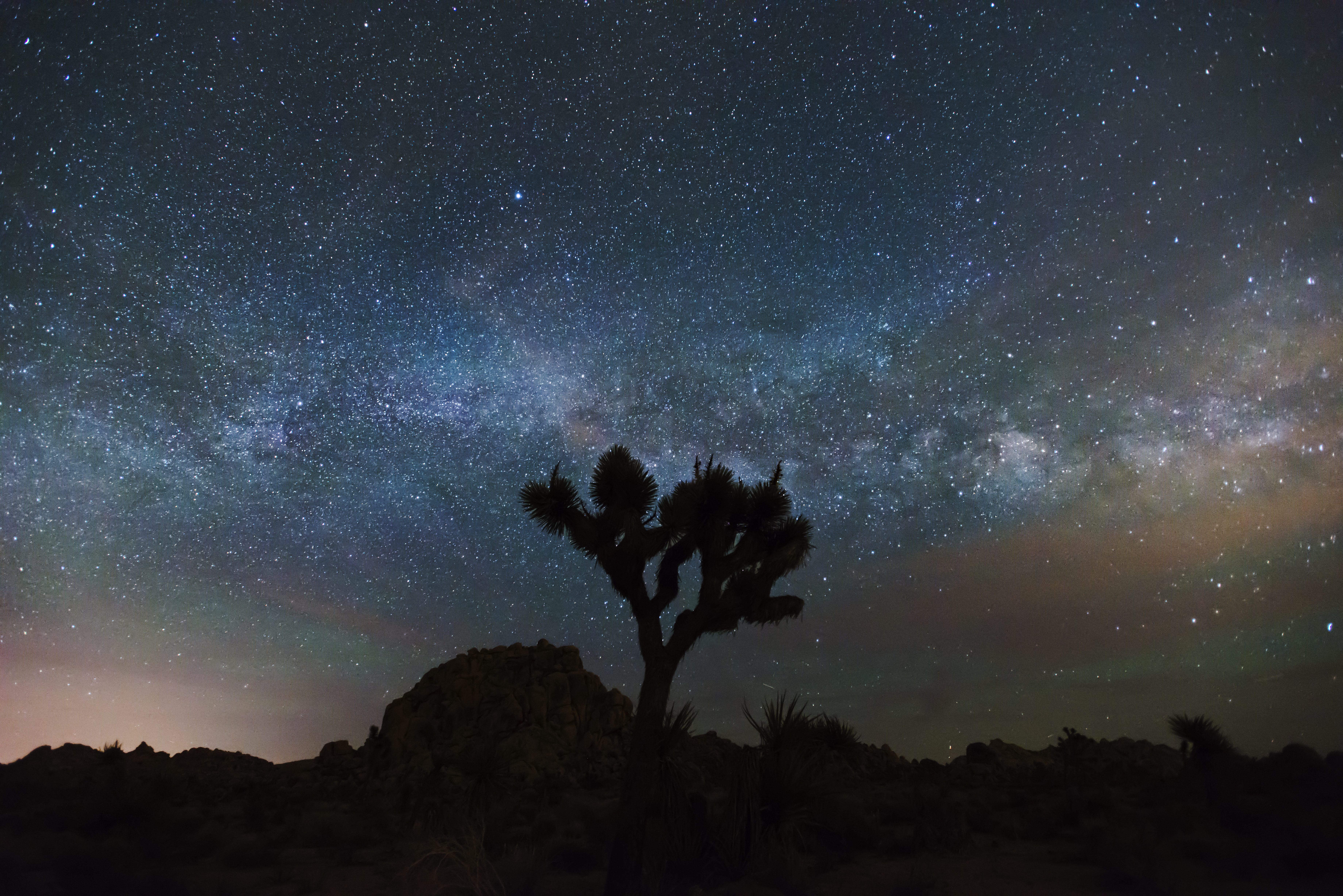 NPS/Brad Sutton